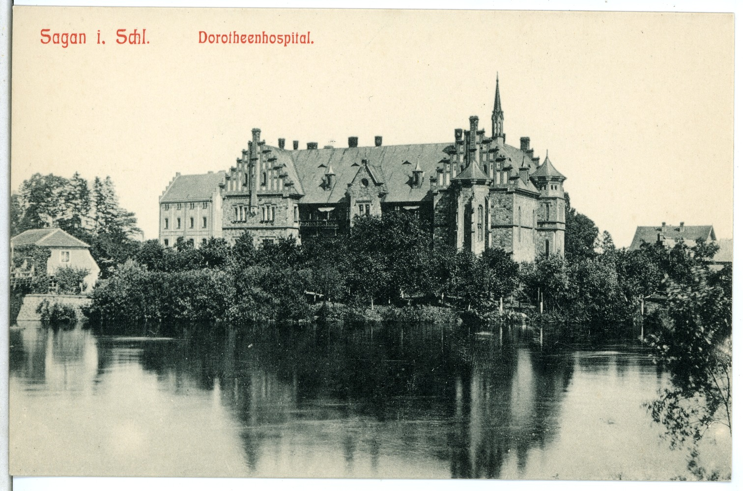 Sagan; Dorotheenhospital This postcard is from publisher Brück & Sohn in Meißen ( postcard has a unique number 07709 and is available in a higher resolution at the publisher. This images was uploaded in a cooperation project between Wikipedians and the publisher.